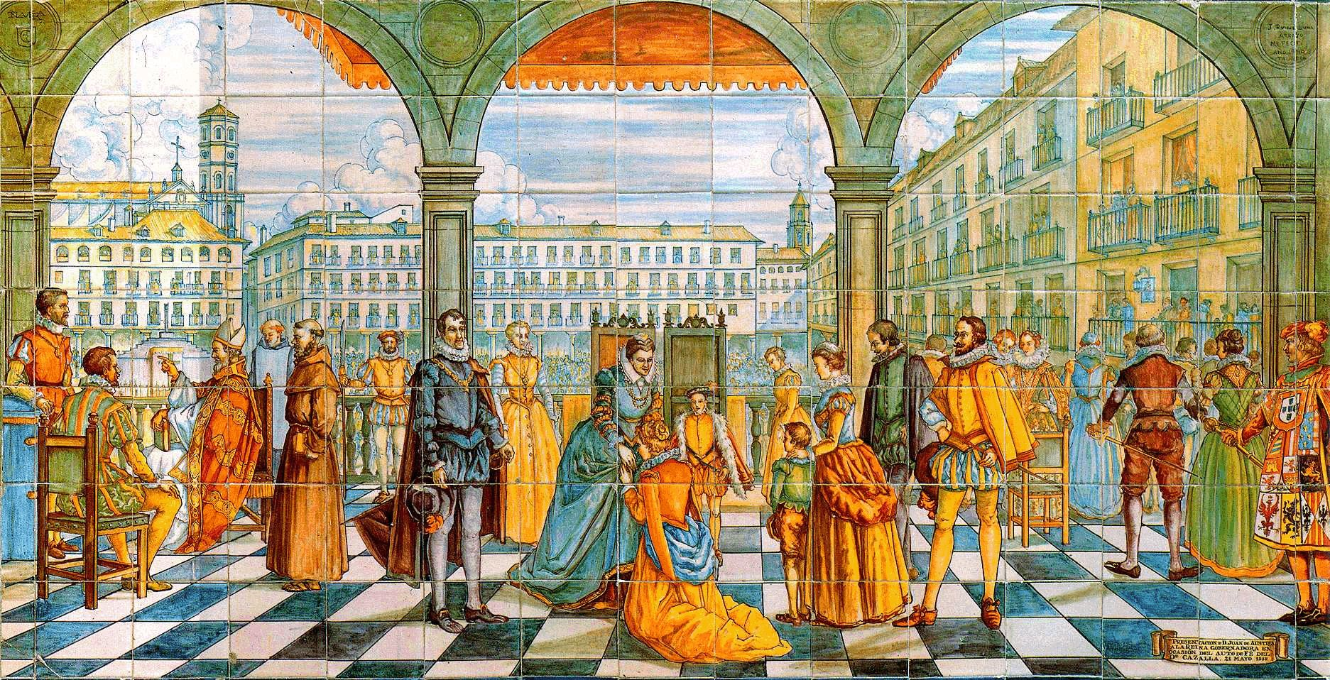 Presentación de Don Juan de Austria con motivo del auto de fe del doctor Cazalla